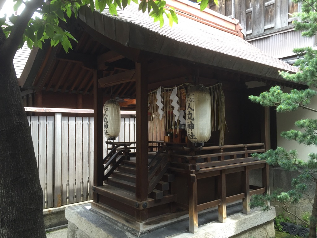 住吉神社境内社人丸神社